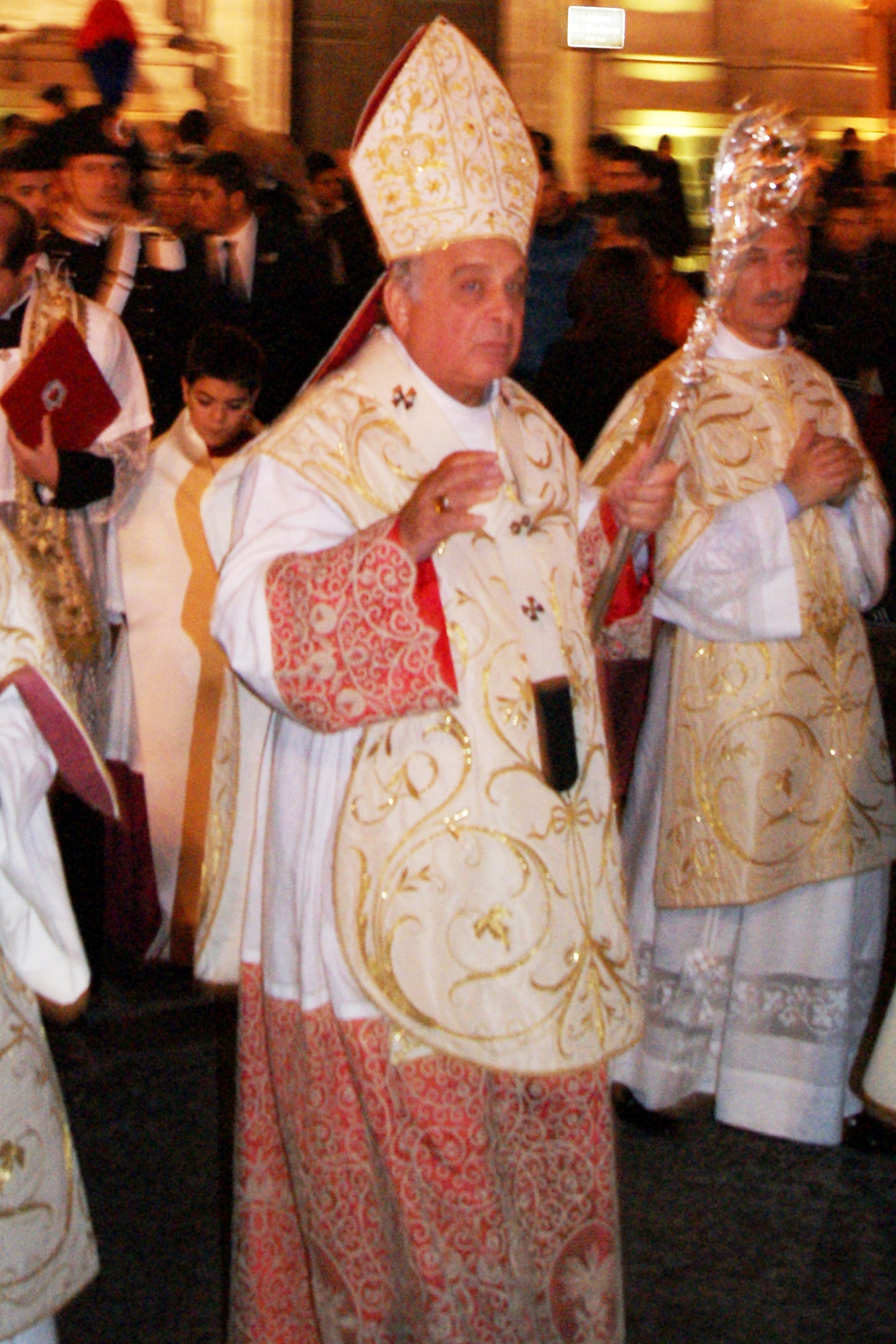 S.E. Mons. Salvatore Gristina, Arcivescovo metropolita di Catania